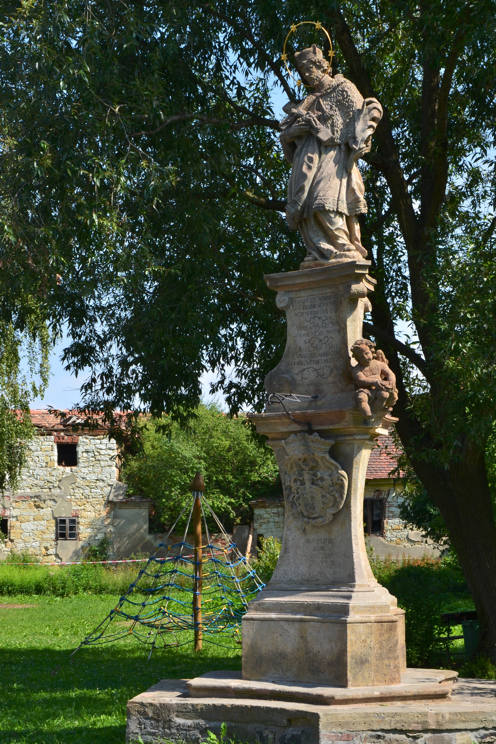 Socha sv. Jana Nepomuckého (Milošice), střed obce, Milošice